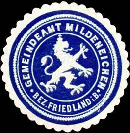 Sealing stamp Title: Gemeindeamt Mildeneichen Bezirk Friedland/Böhmen Description: dunkelblau, weiß, geprägt Place: Mildeneichen/Böhmen size: 3 cm